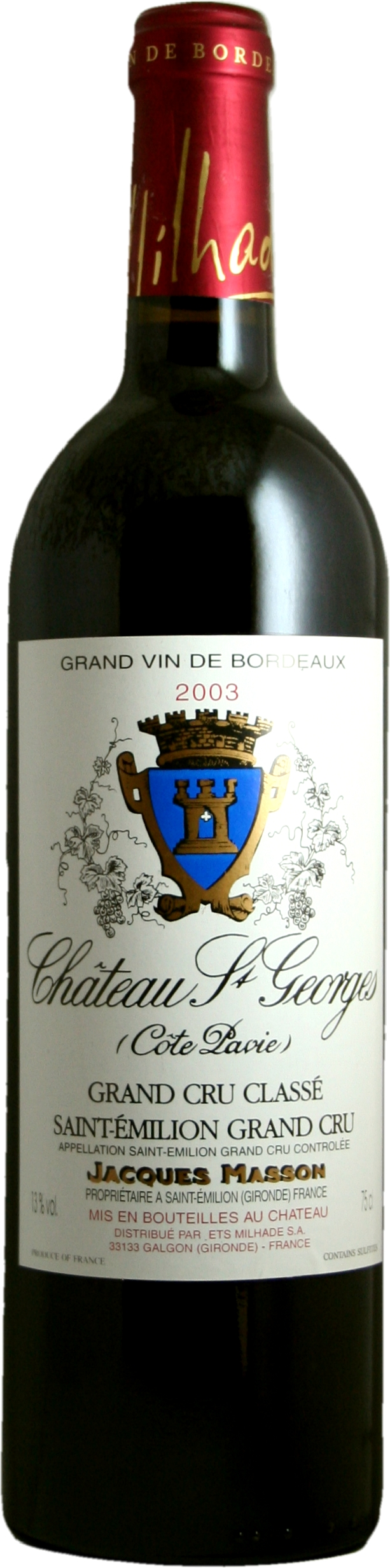 Bouteille chateau Saint Georges 2003